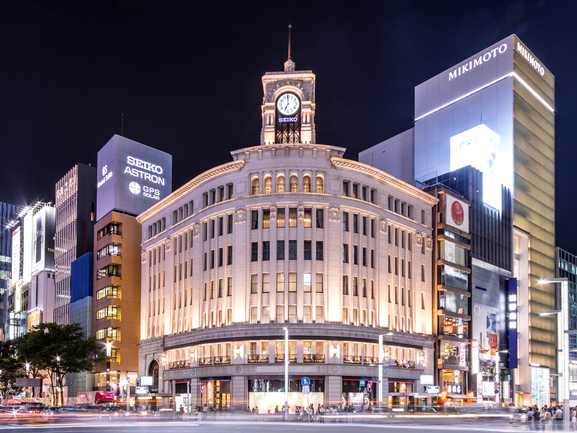 銀座和光（東京都中央区）